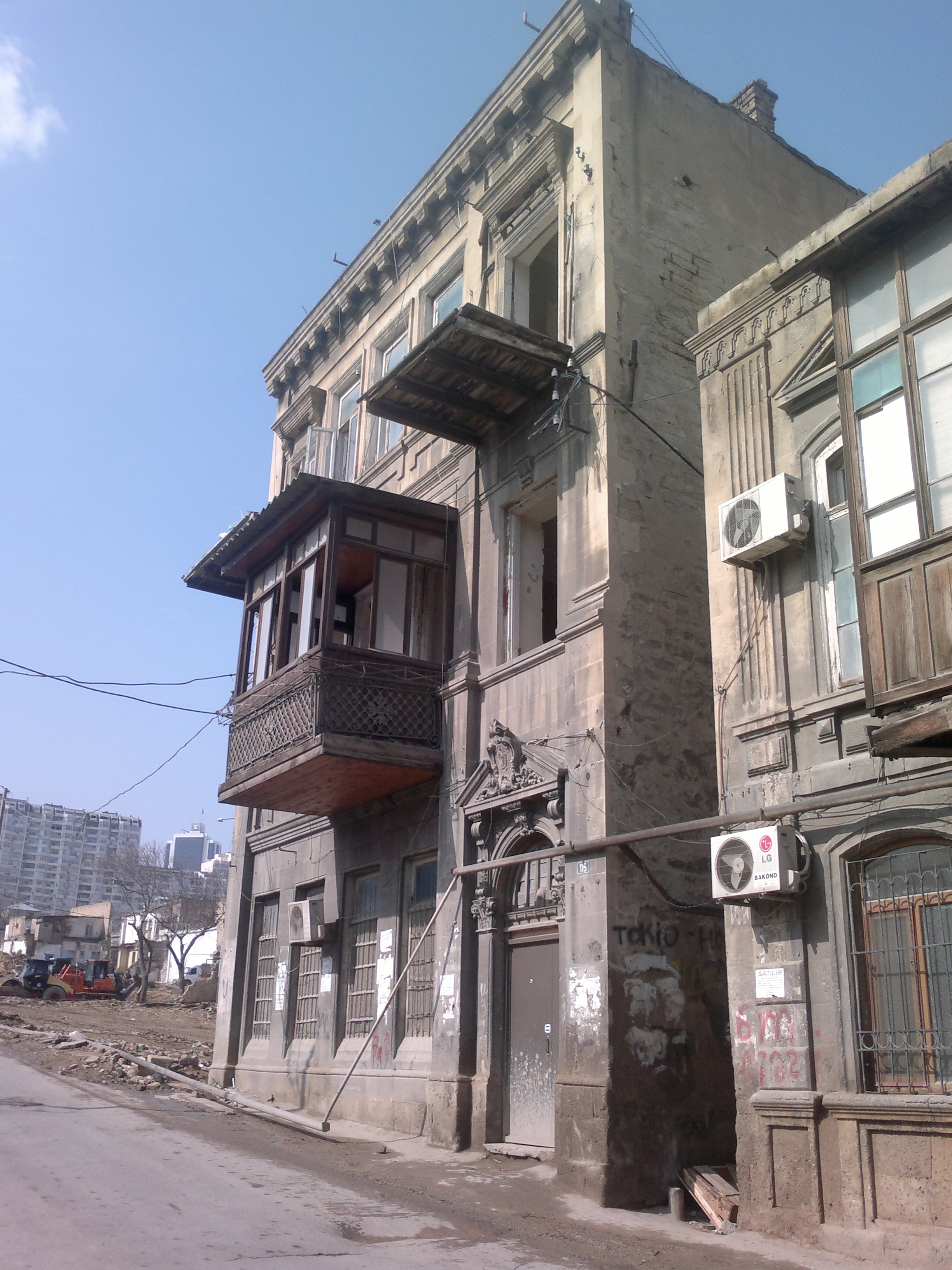 House of Abbas Mirza Sharifzade. Built in 1900.